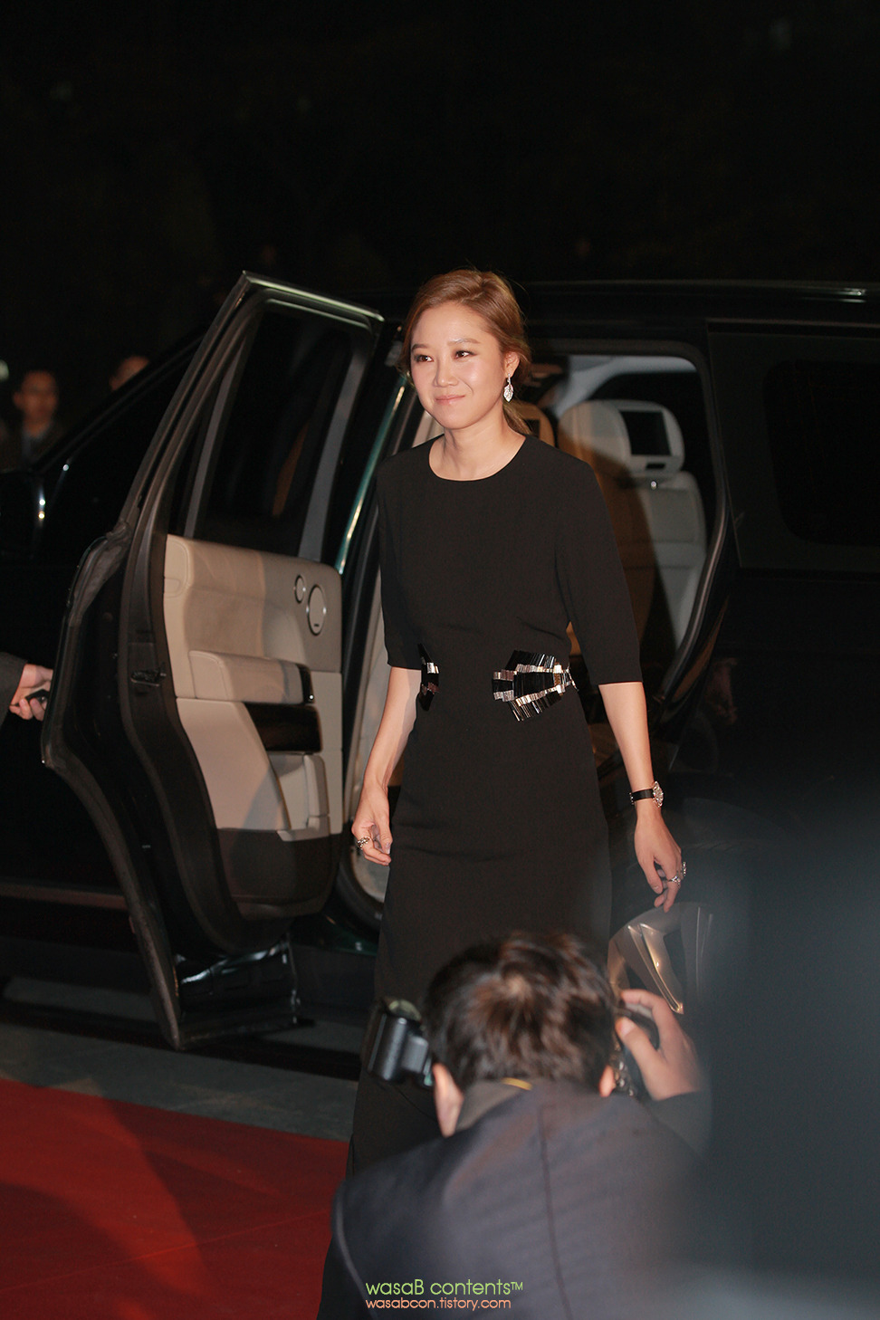 2013 청룡영화제